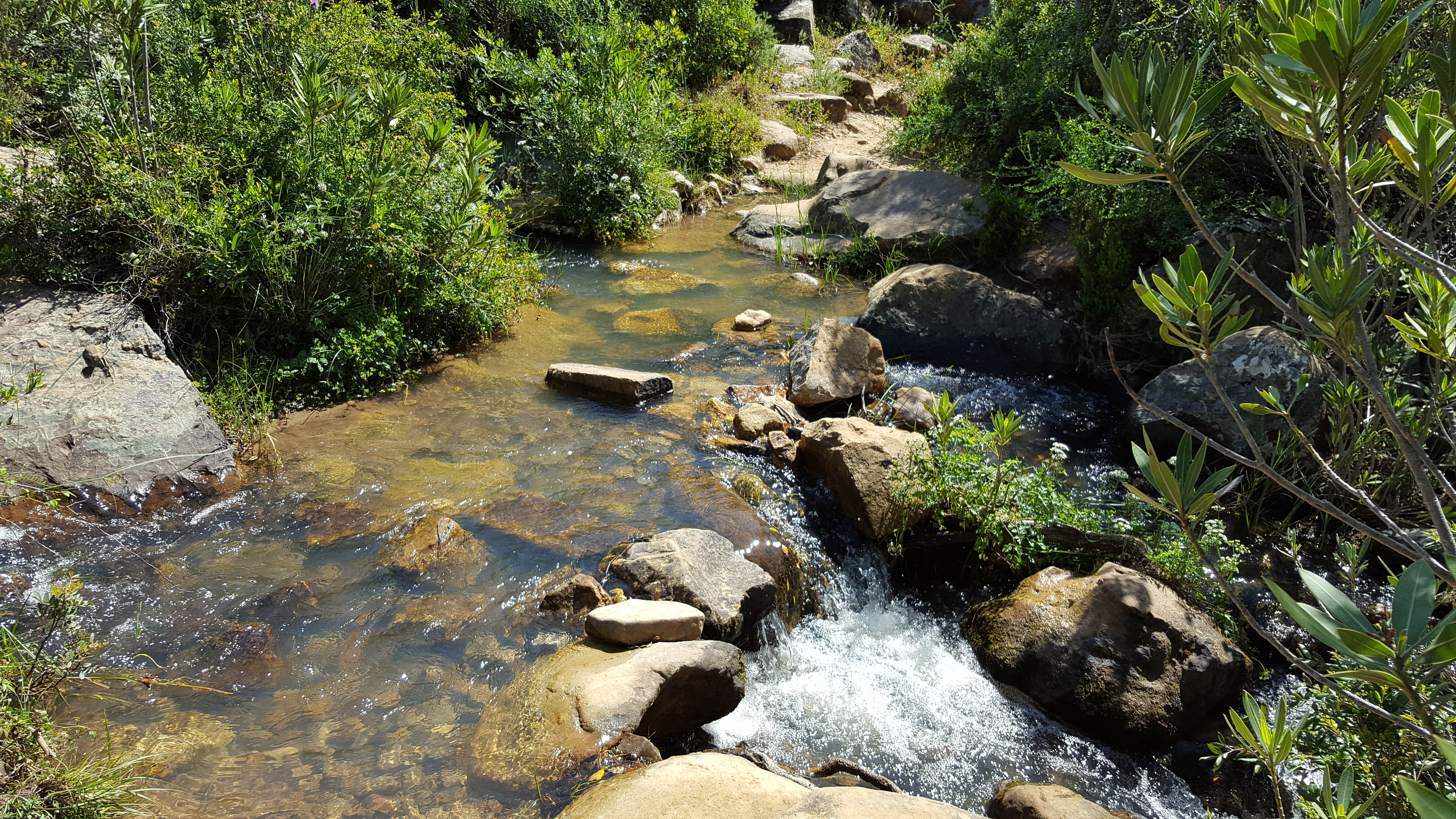 Garganta del Espino afluente del río Rocinejo,Alcalá de los Gazules, Cádiz, España